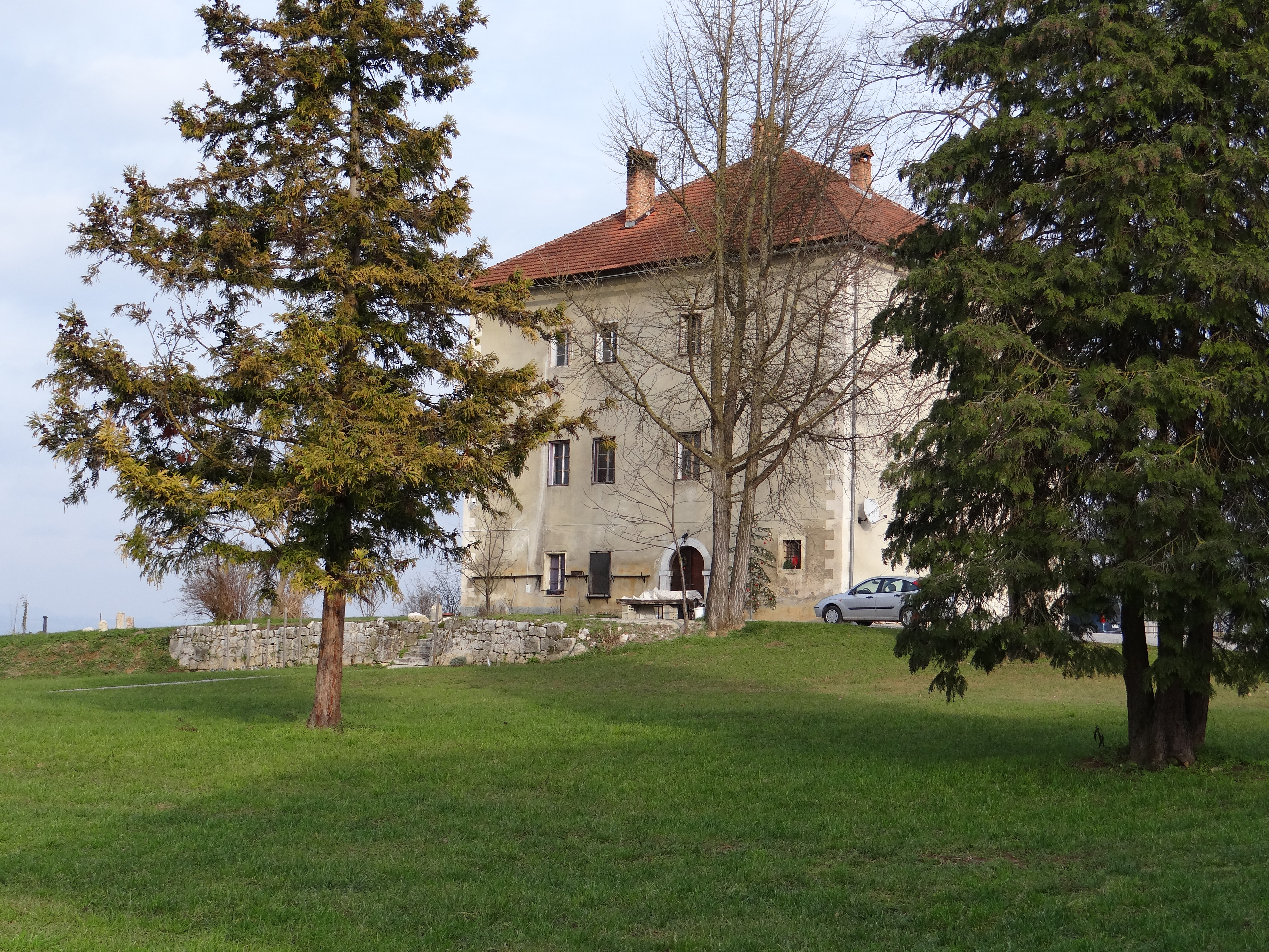 Dvorec Vrhovo I. (Freihof) , Orehovica